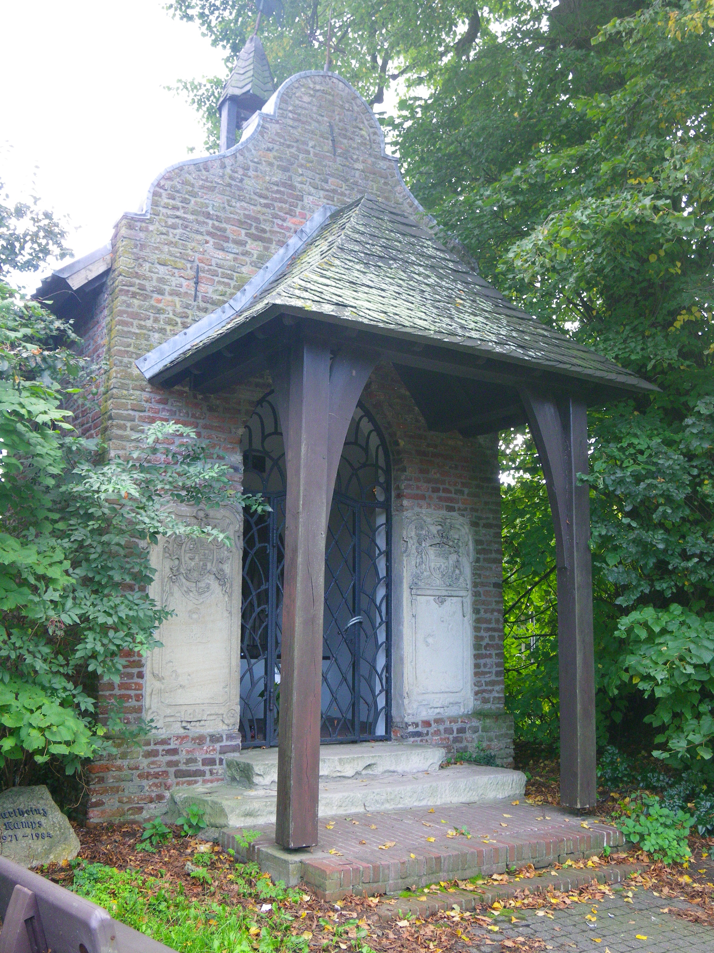 Denkmalgeschützte Kapelle Erstellung: 1806 Ortslage: Haldern, Schledenhorst 1